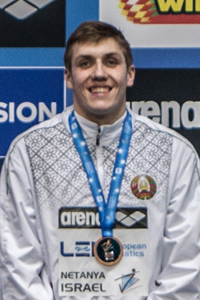 השחיין איליה שימנוביץ' עם מדליית הארד בה זכה במשחה השליחים ל-50X4 מטרים מעורב מעורב באליפות אירופה בבריכות קצרות בנתניה, 2015